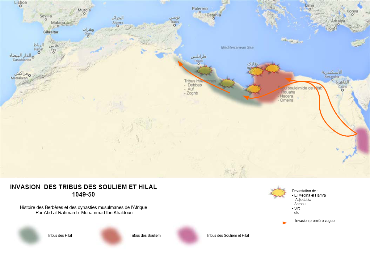 Invasion Souliem et Hilal 1048-50